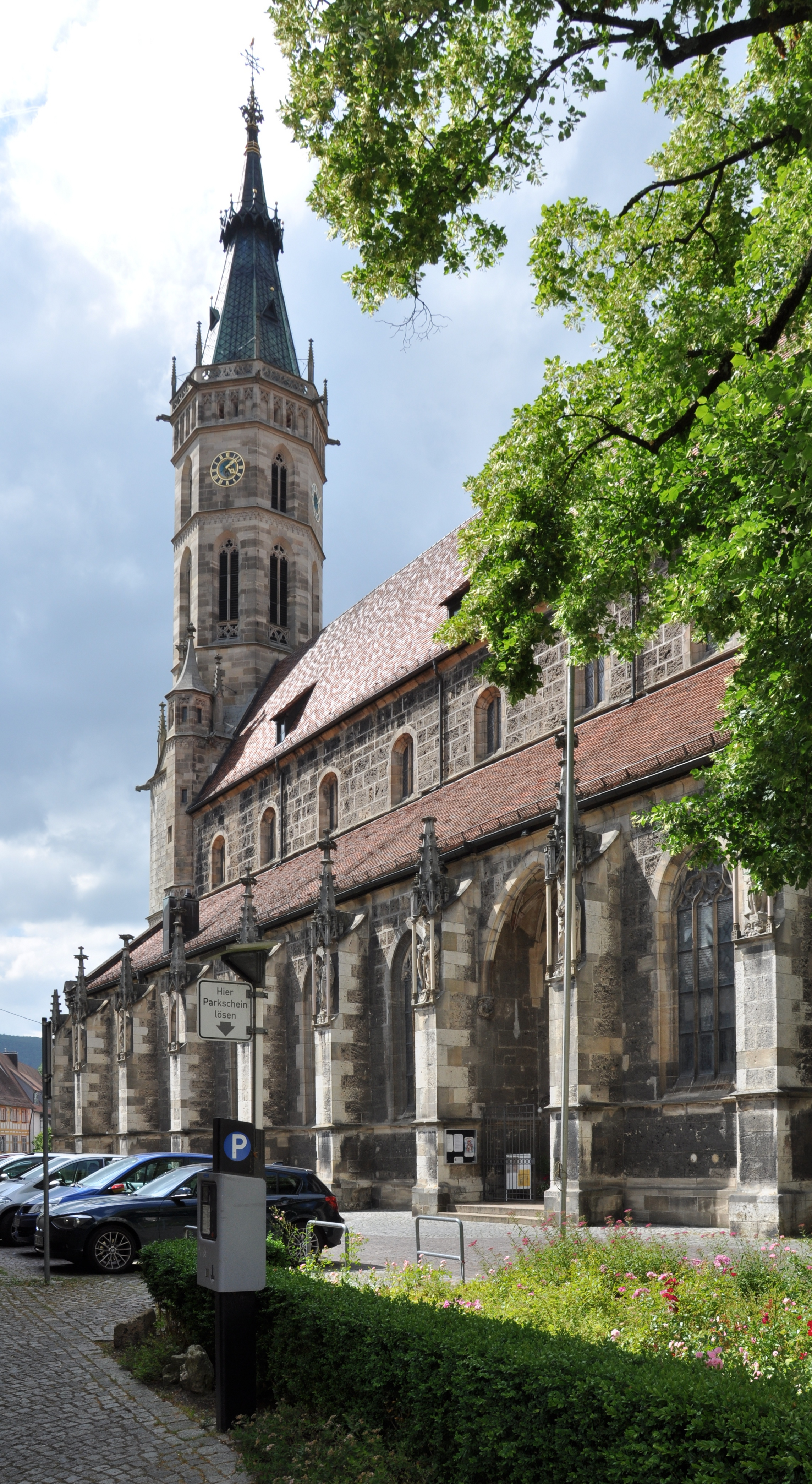 Bad Urach, Stiftskirche St. Amandus, Außenansicht